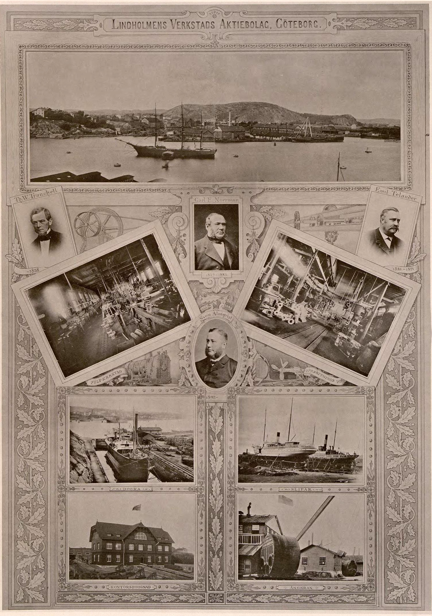 Lindholmens verkstadsaktiebolag